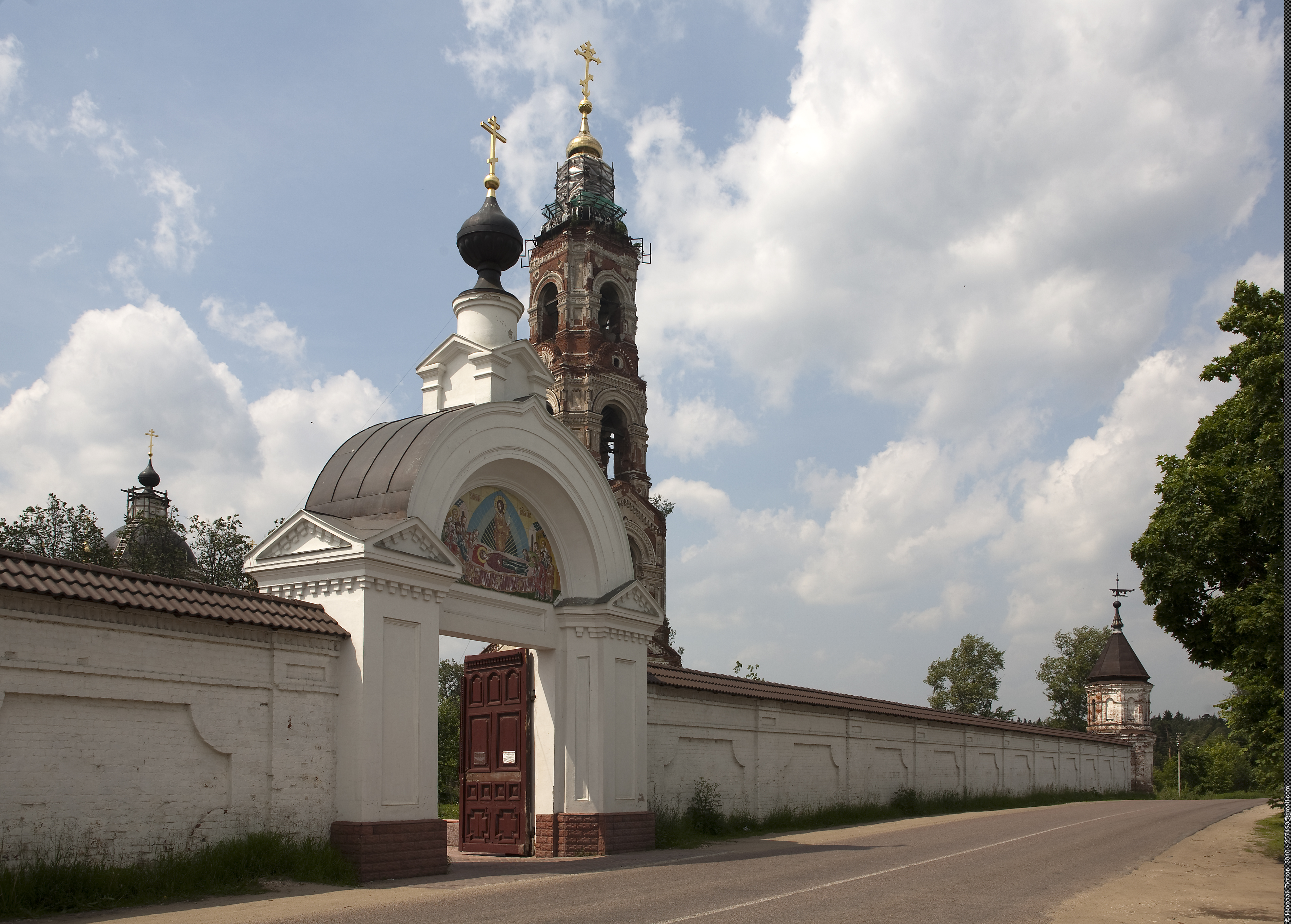 Николо-Берлюковская пустынь (село Авдотьино, Московская область, Ногинский район).